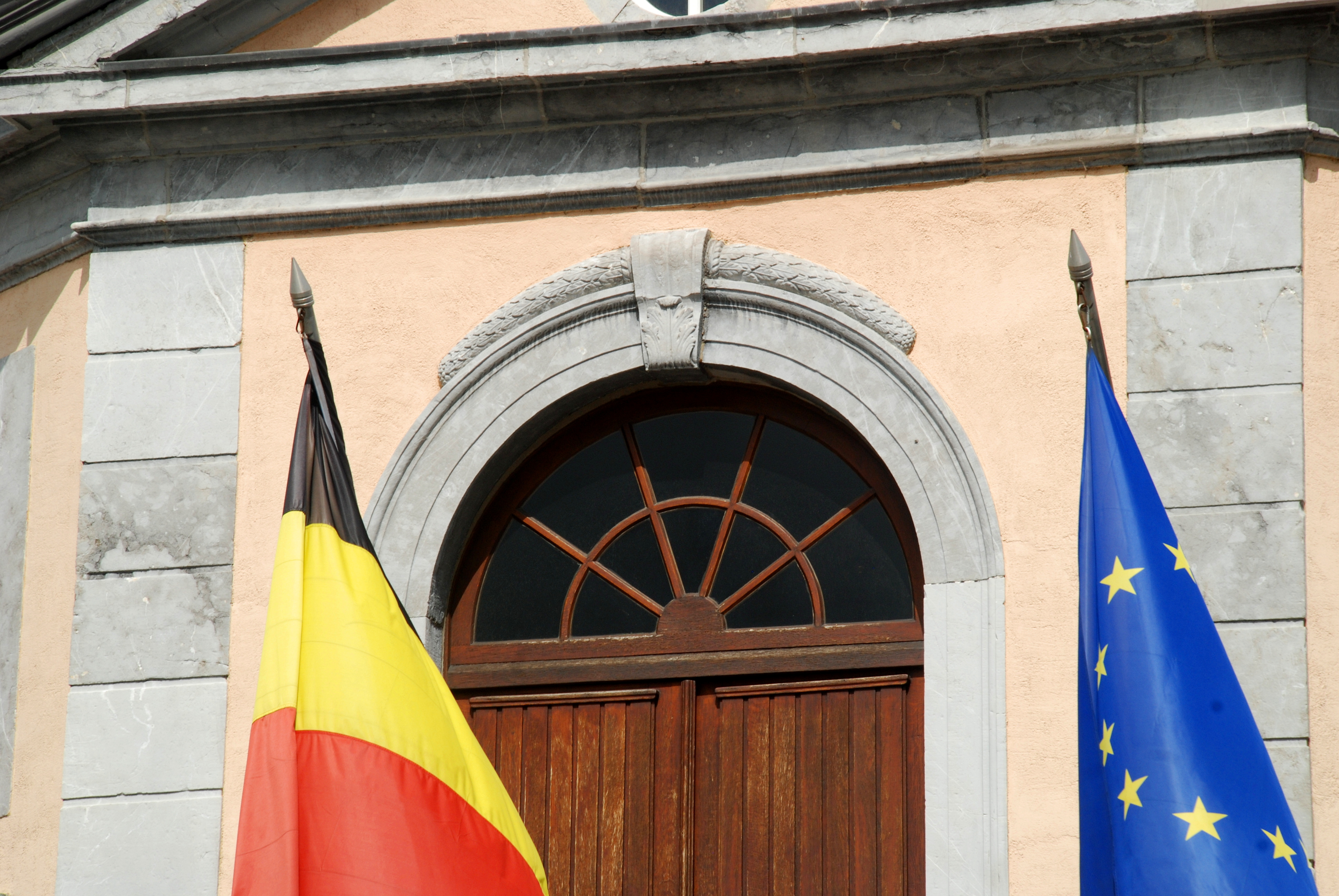 Belgique - Province de Liège - Hôtel de ville de Theux